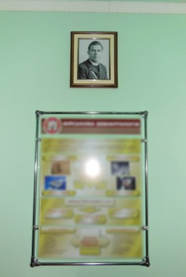 Портрет Нормана Коупленда в класі суспільно-гуманітарних дисциплін на кафедрі Морально-психологічного забезпечення діяльності військ Академії сухопутних військ у Львові.